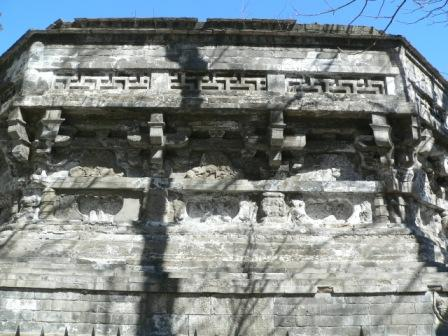 灵光寺内招仙塔遗址 拍摄